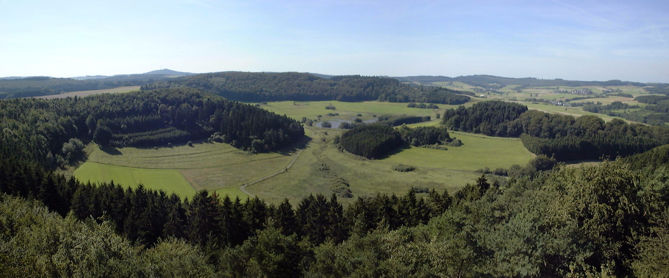 Das Booser Doppelmaar von Osten aus gesehen. Aufnahmeort: Eifelturm (Panoramaaufnahme aus mehreren Bildern, darum leicht verzerrt)